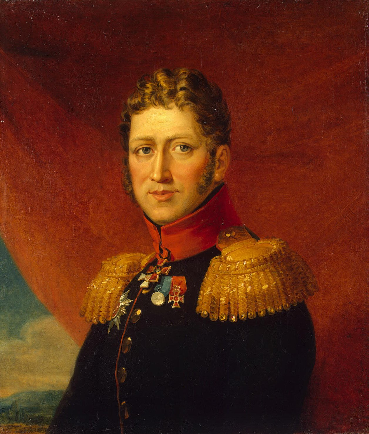 Teyl van Seraskerken (1771 – 1826) russian general